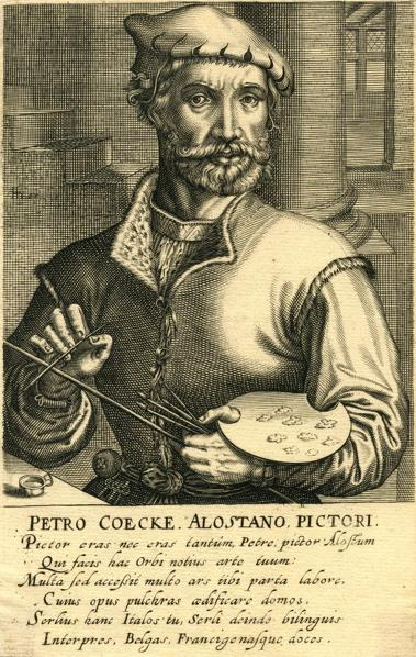 From Pictorum aliquot celebrium praecipuae germaniae inferioris effigies. Avignon, Librairie Seigneur.